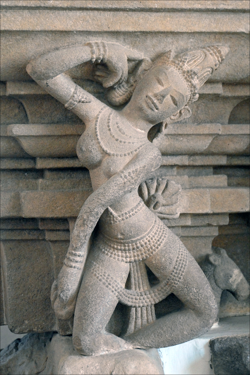 La danseuse de Tra Kieu est l'oeuvre exposée la plus connue. Ce chef d'oeuvre est l'expression d'un art cham qui a atteint des sommets. Grès fin jaune Cette sculpture dans le style de Tra Kieu (influence indo-javanaise) figurait sur un piédestal , Xè siècle. Musée de la sculpture Cham de Danang Construit par l’École Française d’Extrême-Orient en 1915, le musée fut initialement baptisé Musée Henri Parmentier (nom de l’un des premiers explorateurs des sites du Royaume du Champa). Les oeuvres sont classées par provenance et par période, ce qui permet de suivre, de salle en salle, l’évolution de l’art cham au niveau de la sculpture. La majorité des objets proviennent des sites de Tra Kieu (ancienne capitale administrative du Royaume du Champa), de My Son, de Dong Duong (centre bouddhiste) et de Thap Man.